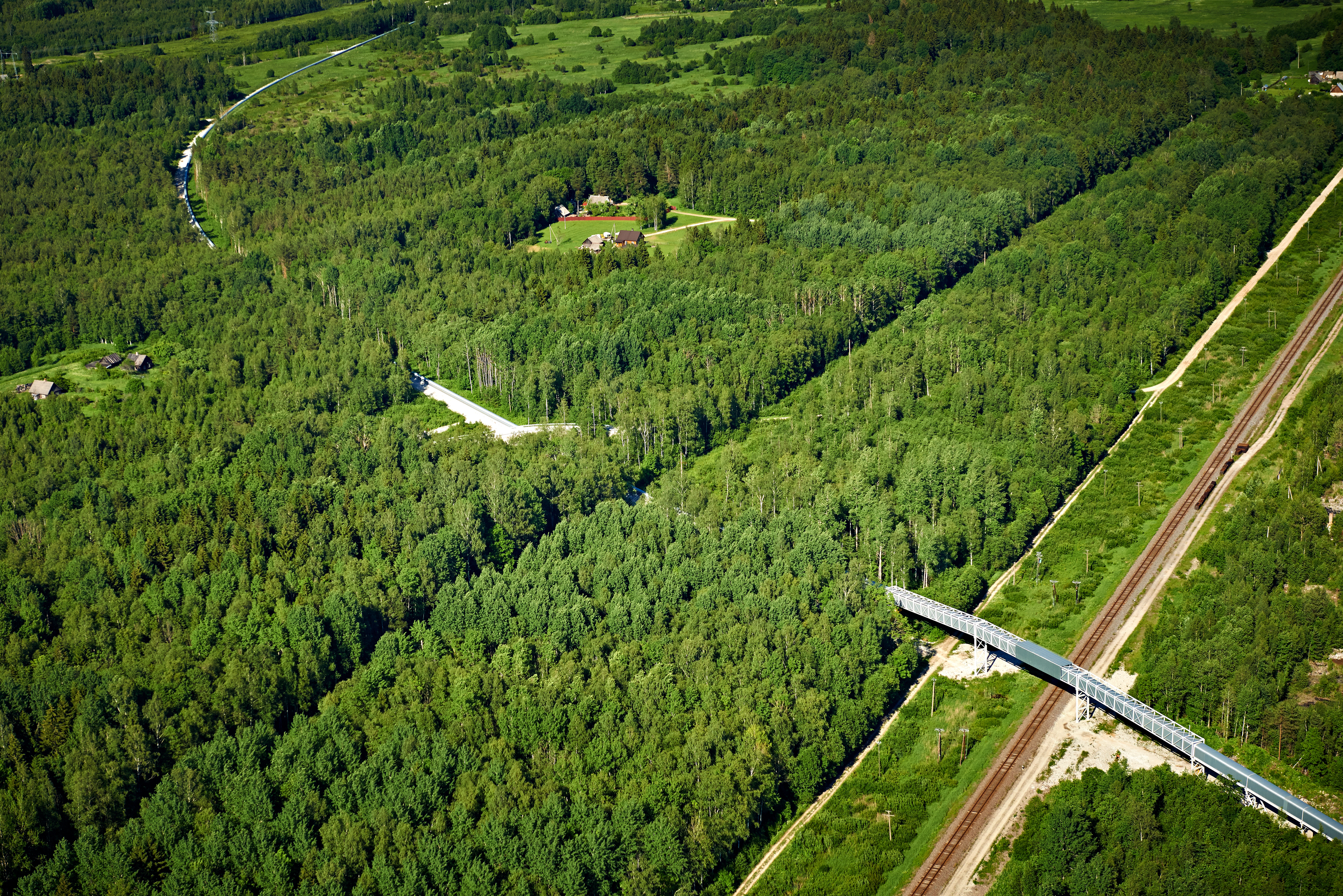 VKG Ojamaa konveier.